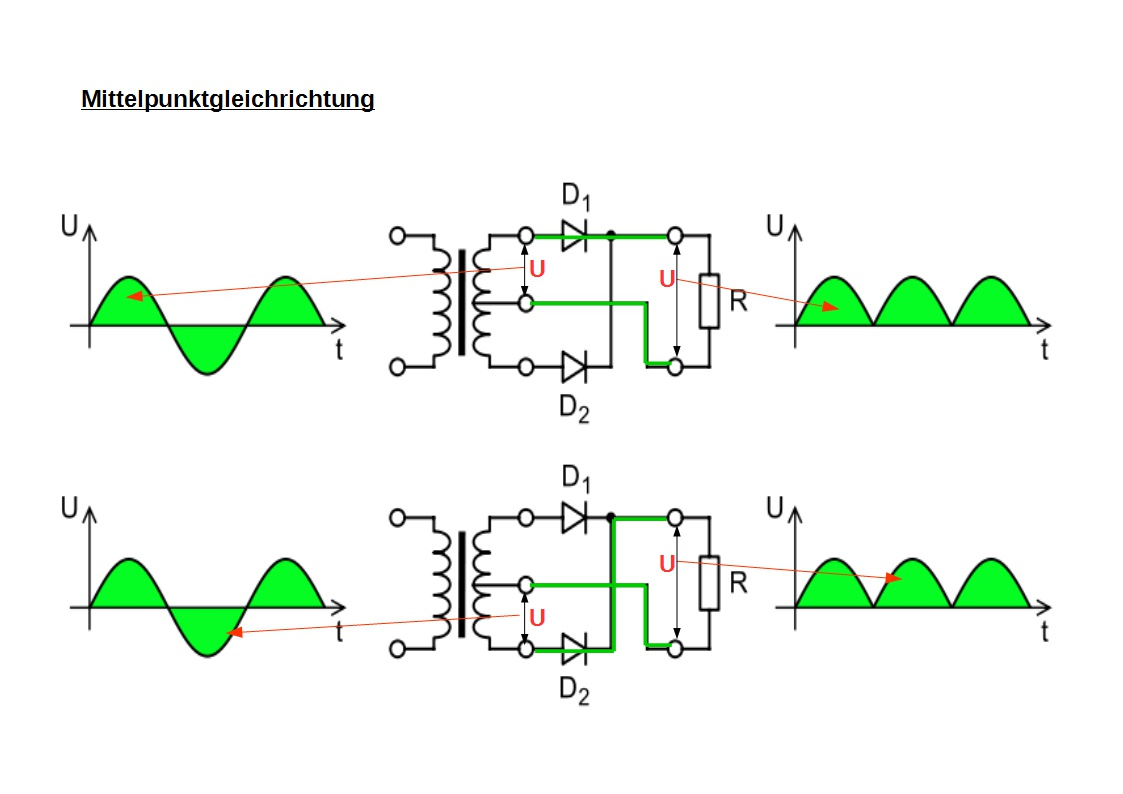 Bearbeitung der Datei Fullwave.rectifier.en.png